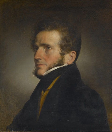 "Ritratto del pittore Giuseppe Canella", olio su tela, 55.5 x 47 cm, Galleria d'arte moderna di Milano